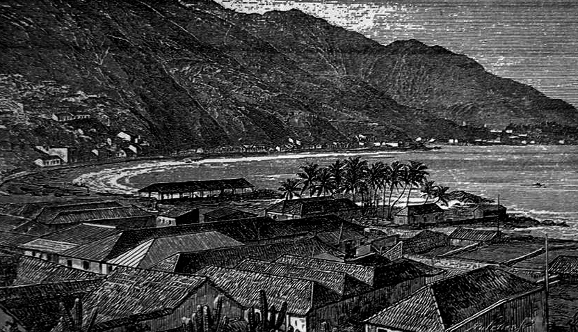 La Guaira en el siglo XIX